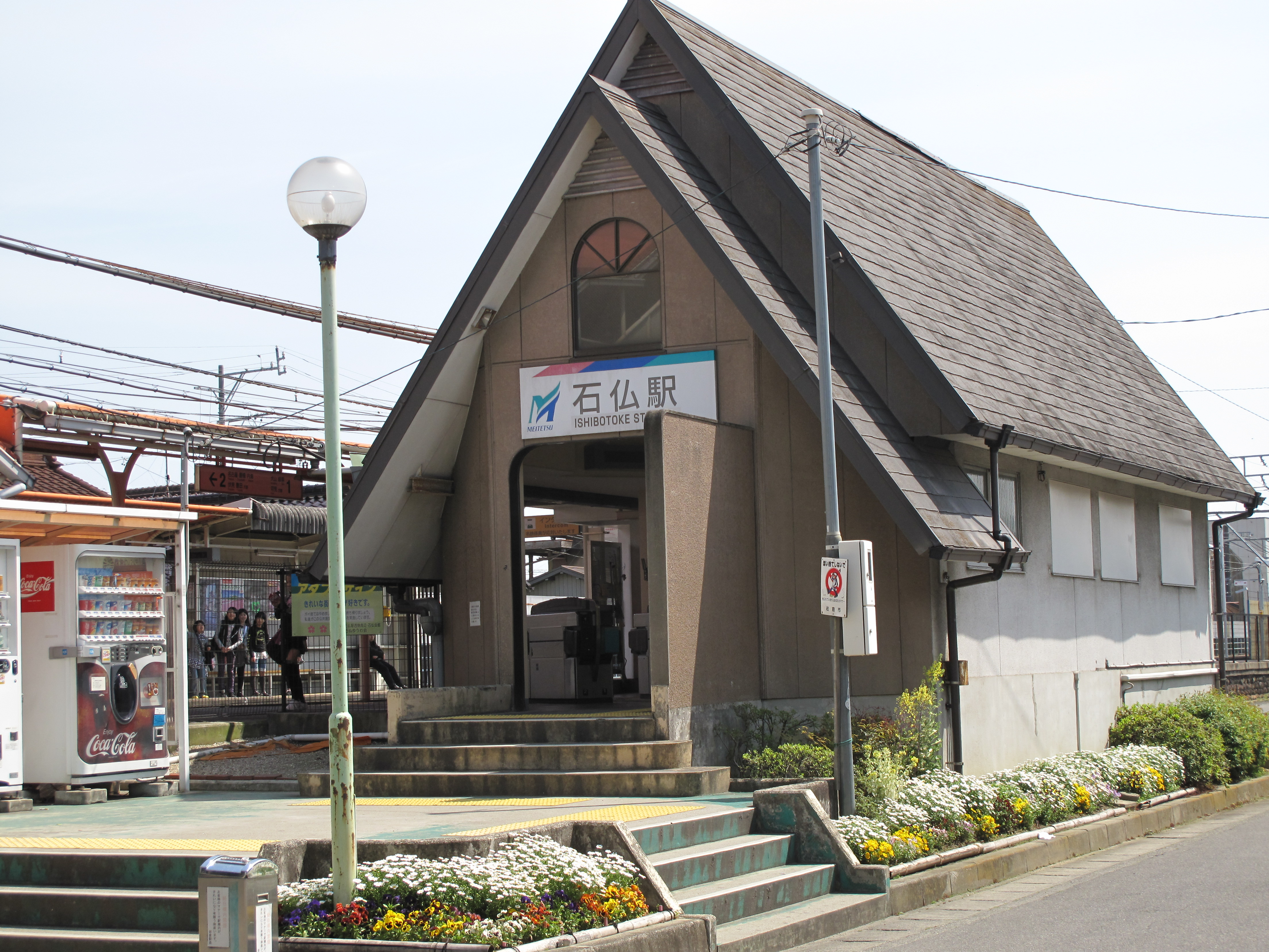 Meitetsu ISHIBOTOKE Station